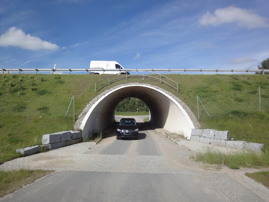 Unterführung Wellstahlbauwerk